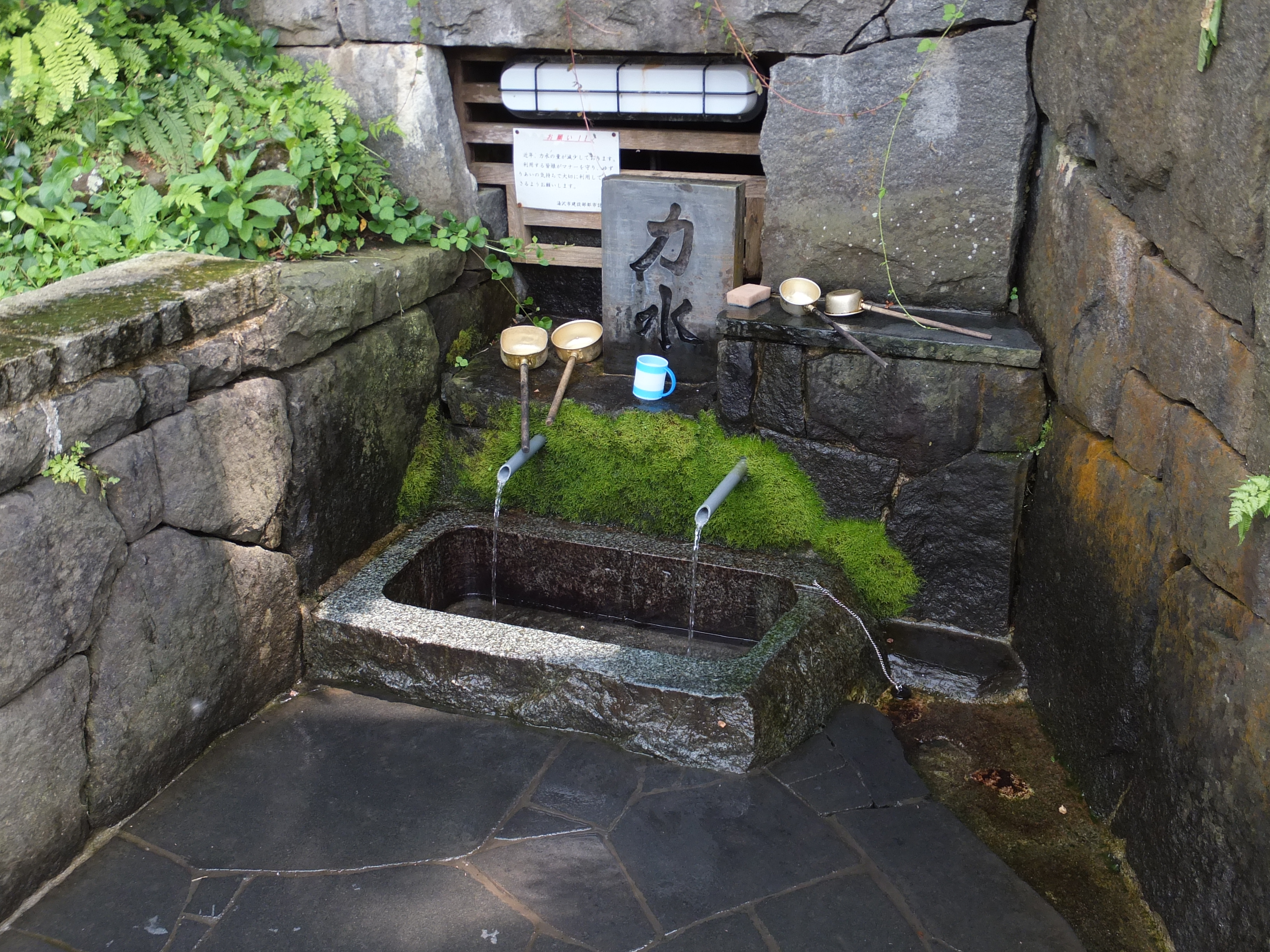 秋田県湯沢市の湧水、力水。近年は湧出量が減少している。